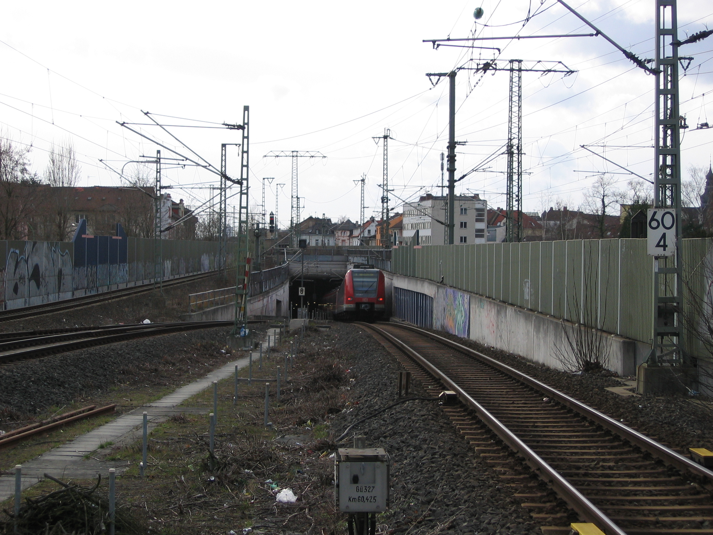 Train type 423 in Offenbach am Main-Ost, Germany entering the City-Tunnel Offenbach/ Baureihe 423 in Offenbach am Main-Ost fährt in den City-Tunnel Offenbach ein